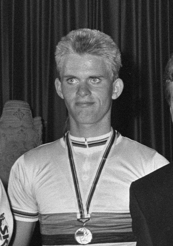 Aankomst Ned. Amateurwielerploeg uit Colorado op Schiphol: Gerrit de Vries